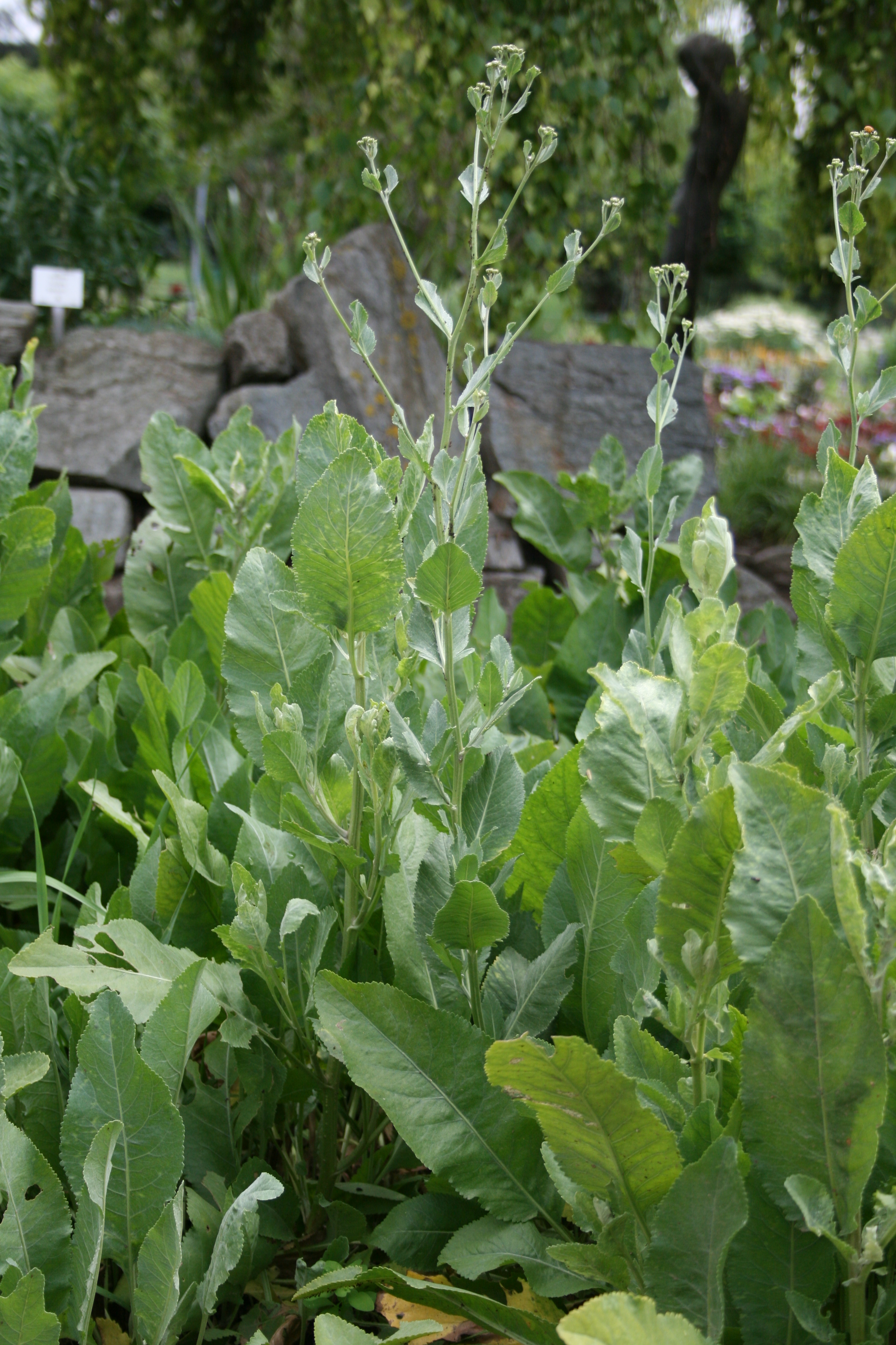 Tanacetum